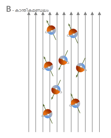 ശക്‌തിയേറിയ ഈ കാന്തികമണ്ഡലത്തിൽ കുറെ എണ്ണം പ്രോട്ടോണുകൾ കാന്തികമണ്ഡലത്തിന് നേരെയും കുറെ എണ്ണം എതിരായും നിൽക്കുന്നു. കാന്തികമണ്ഡലത്തിന് നേരെ നിൽക്കുന്ന എണ്ണം എതിരെ നിൽക്കുന്നവയെക്കാൾ അല്പം കൂടുതൽ ആയിരിയ്ക്കും. അധികമായുള്ള ഈ പ്രോട്ടോണുകൾ ഈ മേഖലയ്ക്ക് ഒരു ചെറിയ കാന്തികശക്തി നൽകുന്നു. ചുറ്റുമുള്ള കാന്തികമണ്ഡലവുമായി തട്ടിച്ചു നോക്കുമ്പോൾ ഇത് വളരെ നിസ്സാരമാണെങ്കിലും ഈ കാന്തികപ്രഭാവം അളന്നെടുക്കാൻ സാധിച്ചാൽ ഇവയിലെ പ്രോട്ടോണുകളുടെ എണ്ണത്തിന്റെ ഒരു കണക്ക് ഉണ്ടാക്കിയെടുക്കാൻ സാധിയ്ക്കും.